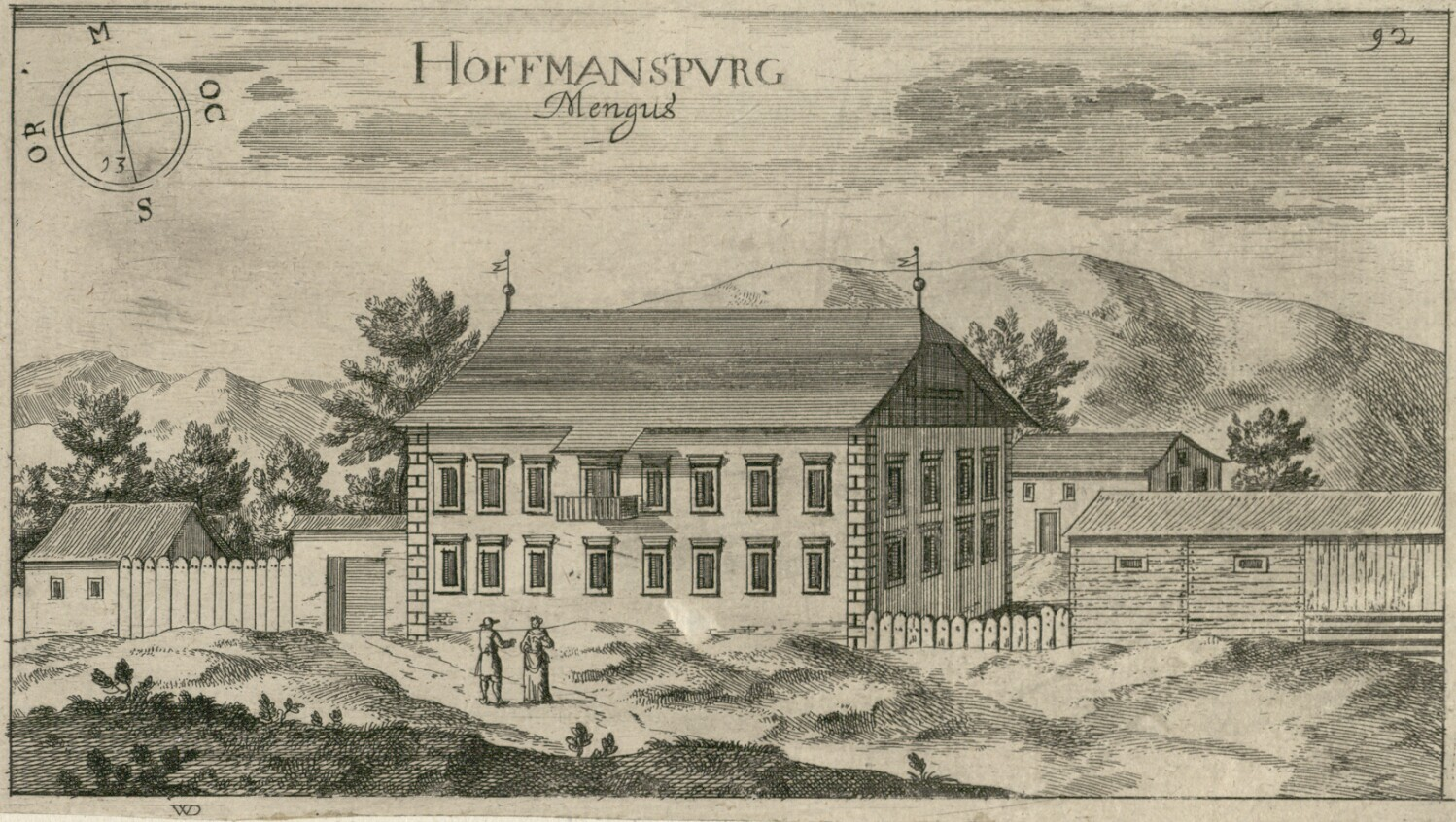 Ravbarjev grad